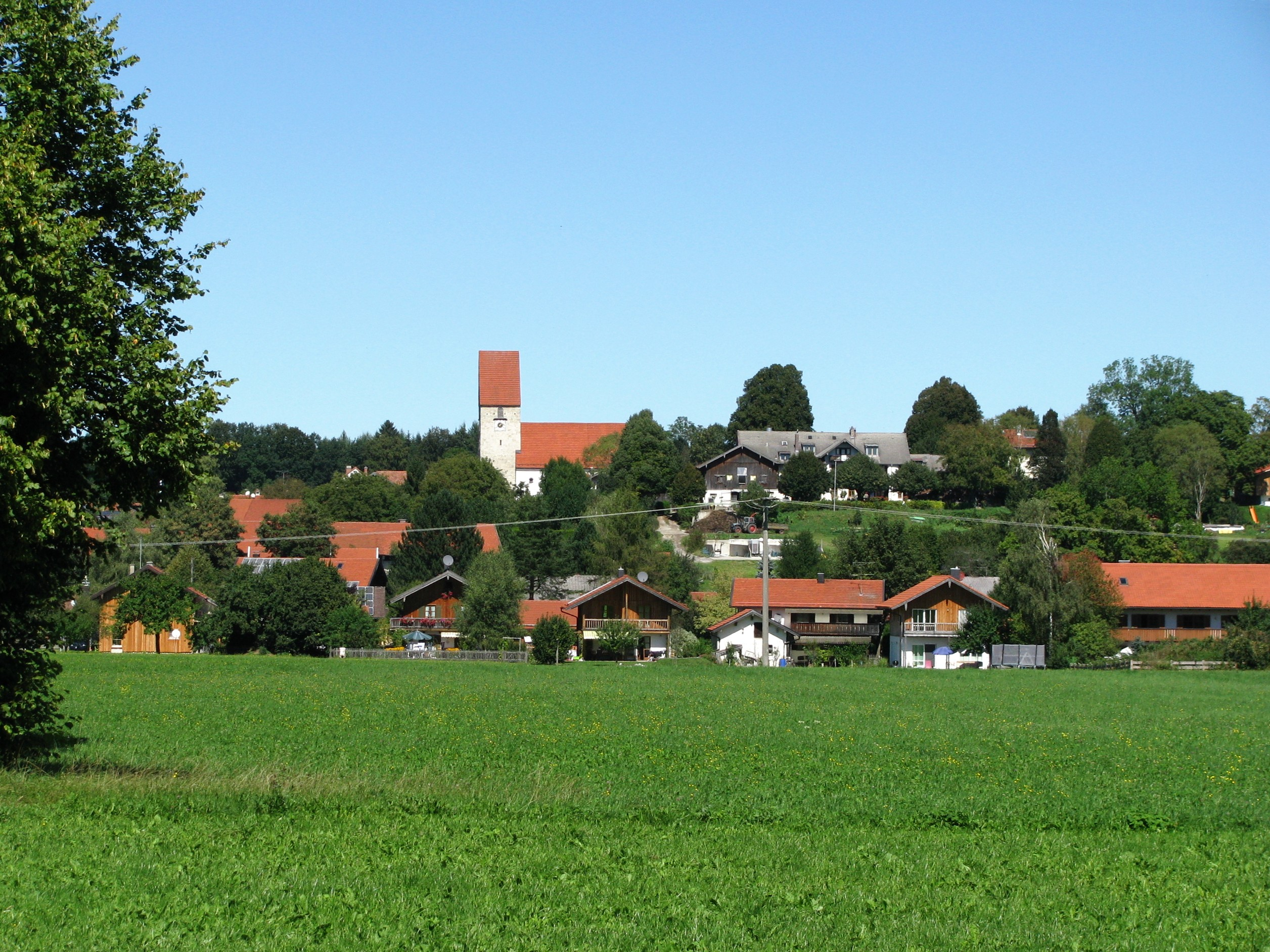 Linden in der Gemeinde Dietramszell, Ansicht aus Süden